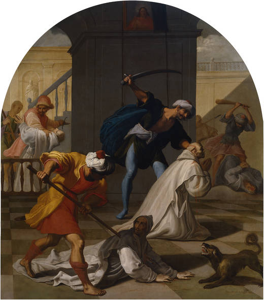 Martirio de los cartujos de Mauerbachlabel QS:Les,"Martirio de los cartujos de Mauerbach"